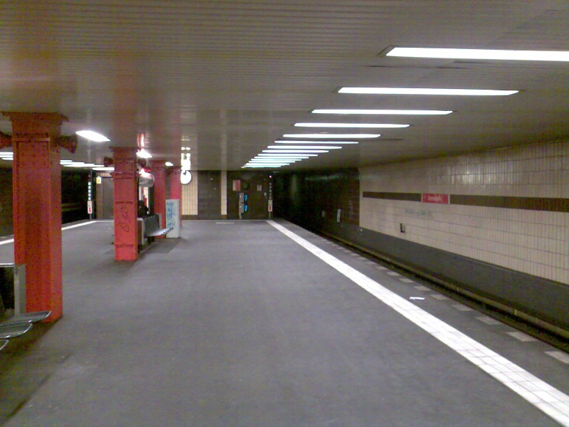 U-Bahnhof Vinetastrasse (U2) in Berlin-Pankow